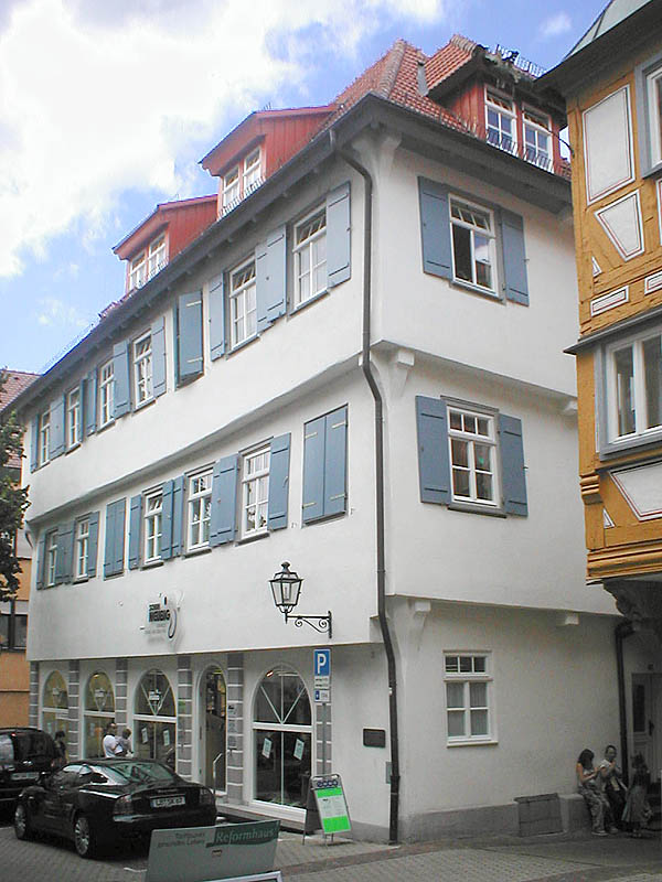 Ehemaliges Oberamtsgebäude (bis 1800) in Brackenheim